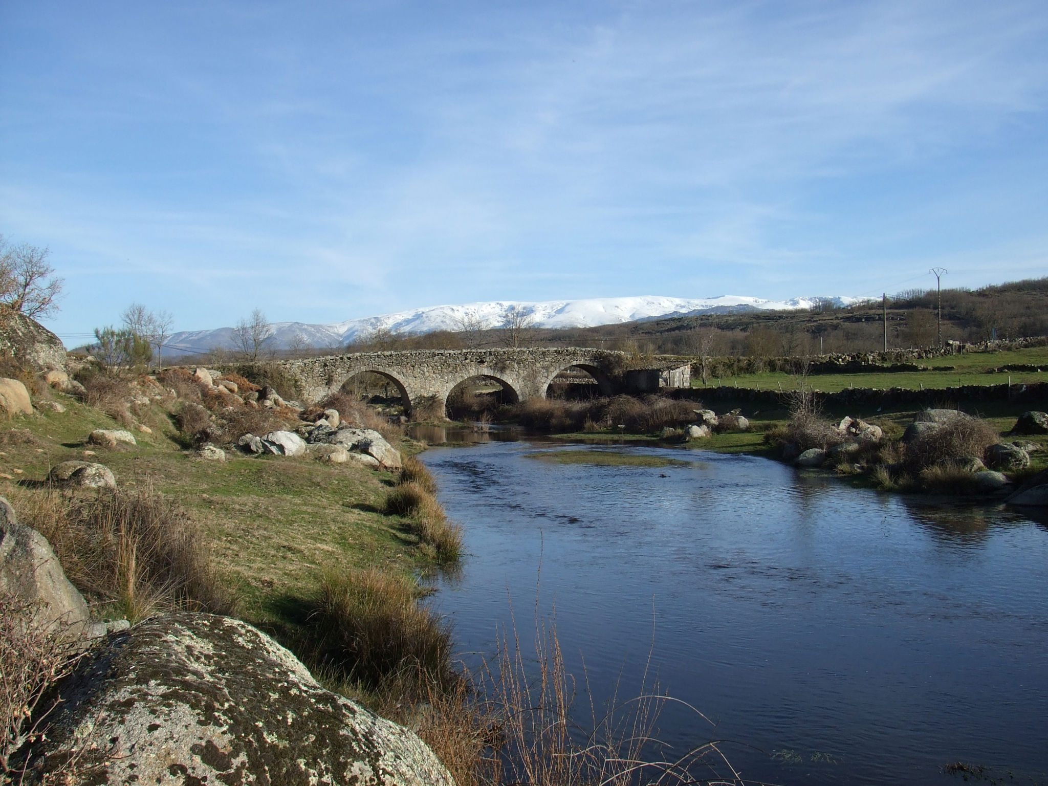 Puente sobre el río Sangusín en Horcajo de Montemayor